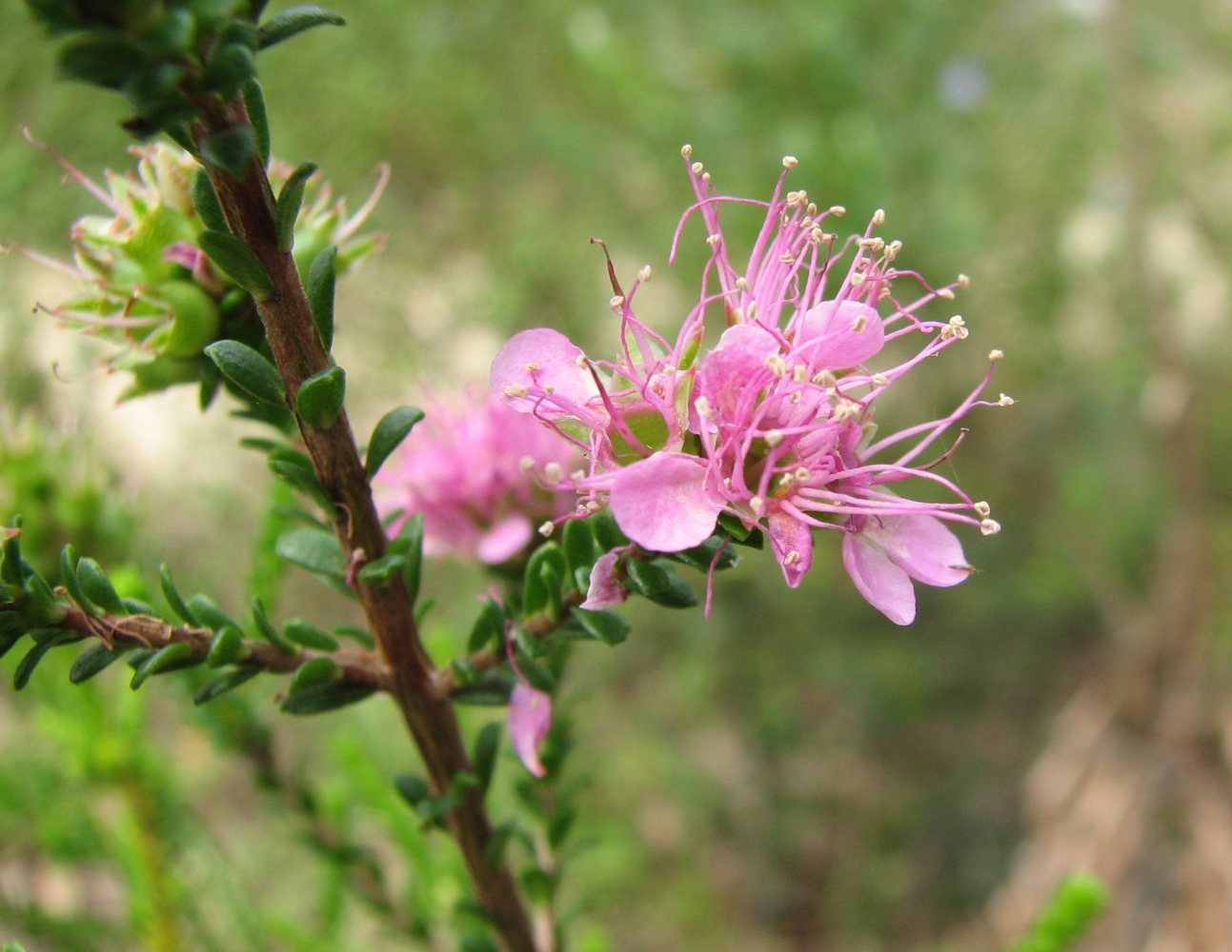 Kunzea jucunda (cultivated, labelled), Maranoa Gardens, Balwyn, Victoria, Australia